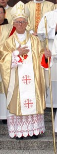 Stanisław Nagy